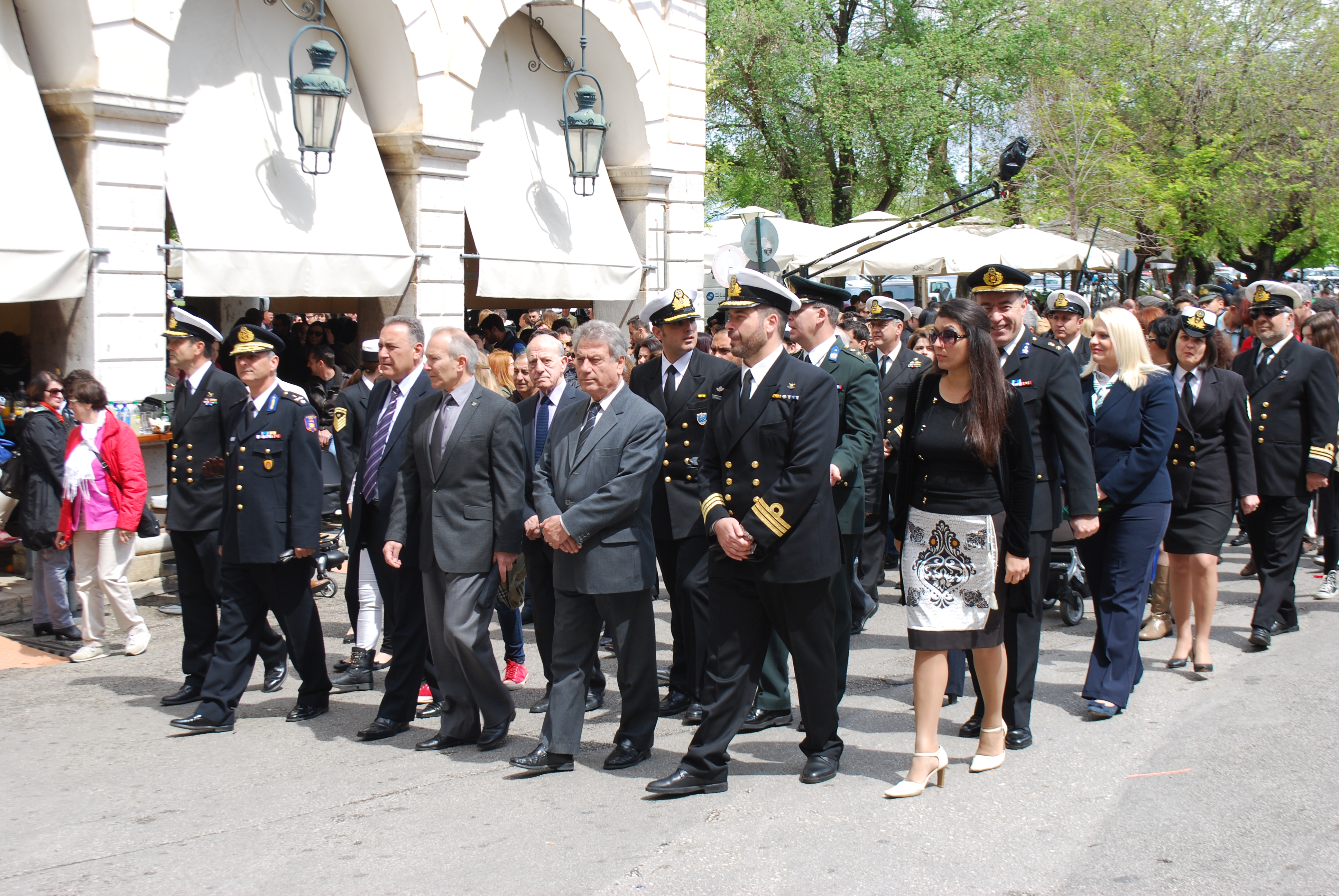 Vue de la ville de Corfou.